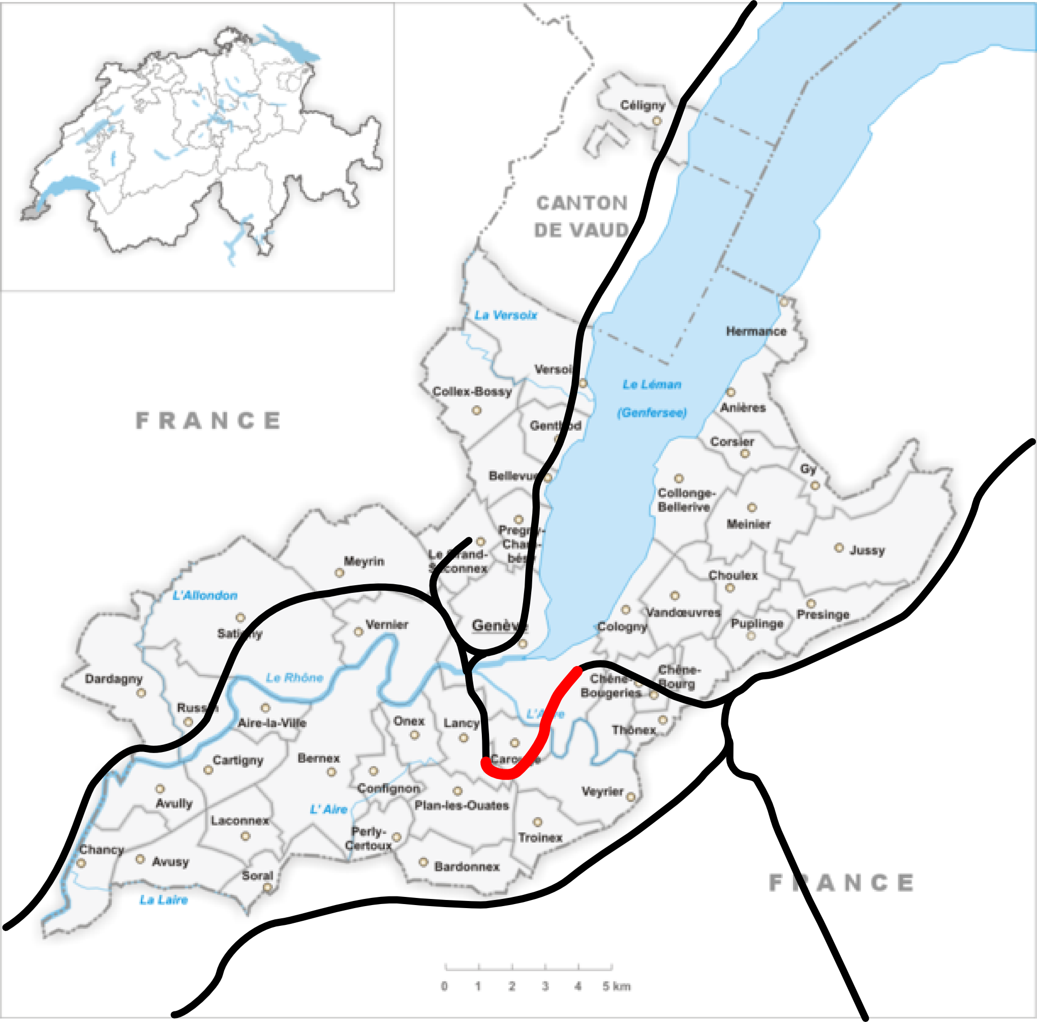 Tracé du CEVA à Genève, Suisse : tronçon à construire